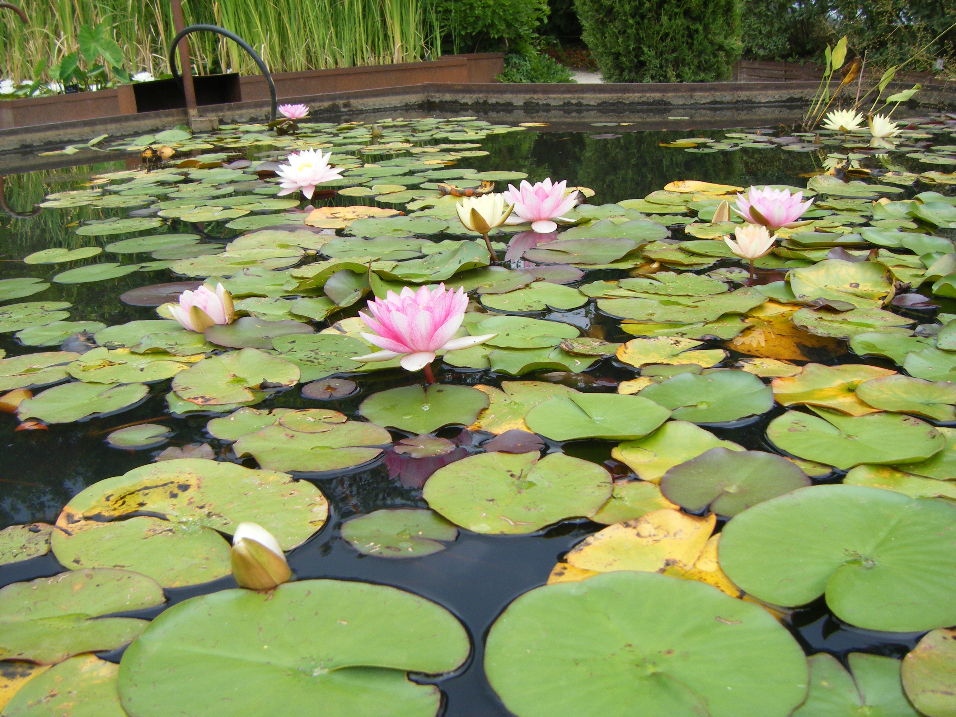 fleurs de lotus